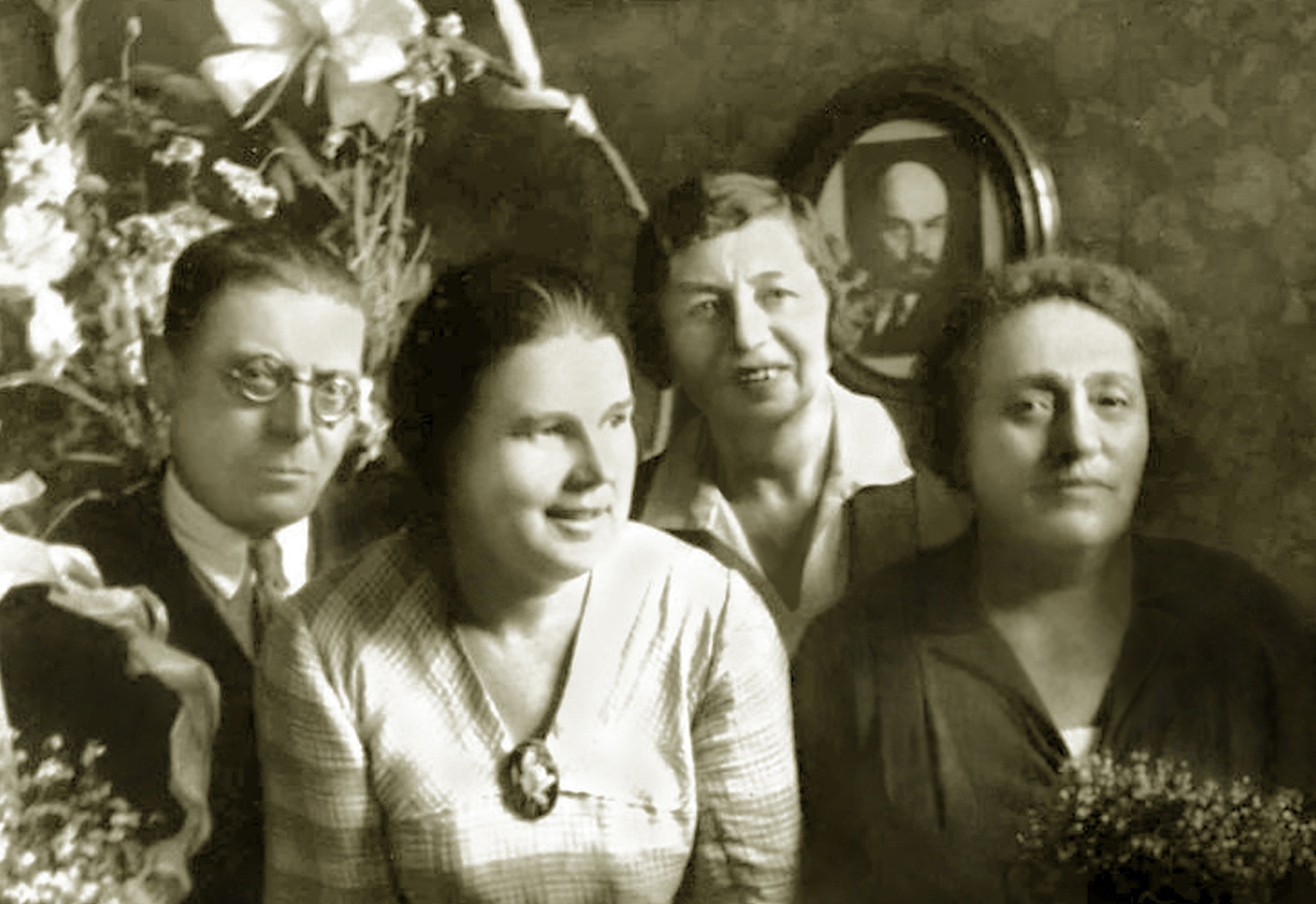 Директор института Охраны материнства и младенчества проф. Юлия Ароновна Менделева (крайняя справа) с единомышленниками: зам. директора института Давид Самуилович Тумаркин, проф. Полина Осиповна Эфрусси и доц. Зинаида Осиповна Мичник.